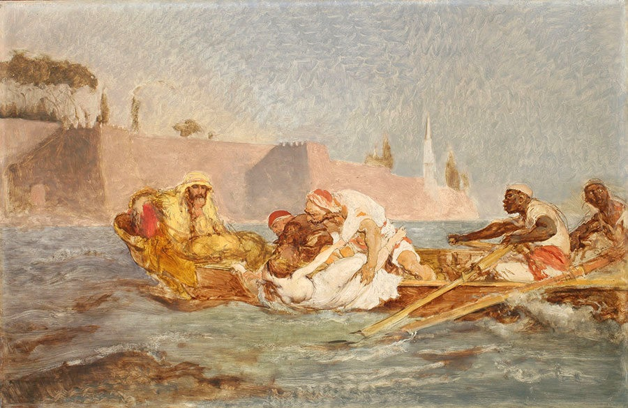 Hassan topi niewierną żonę (Utopiona w Bosforze)